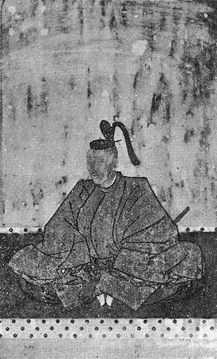 喜多見勝忠の肖像。